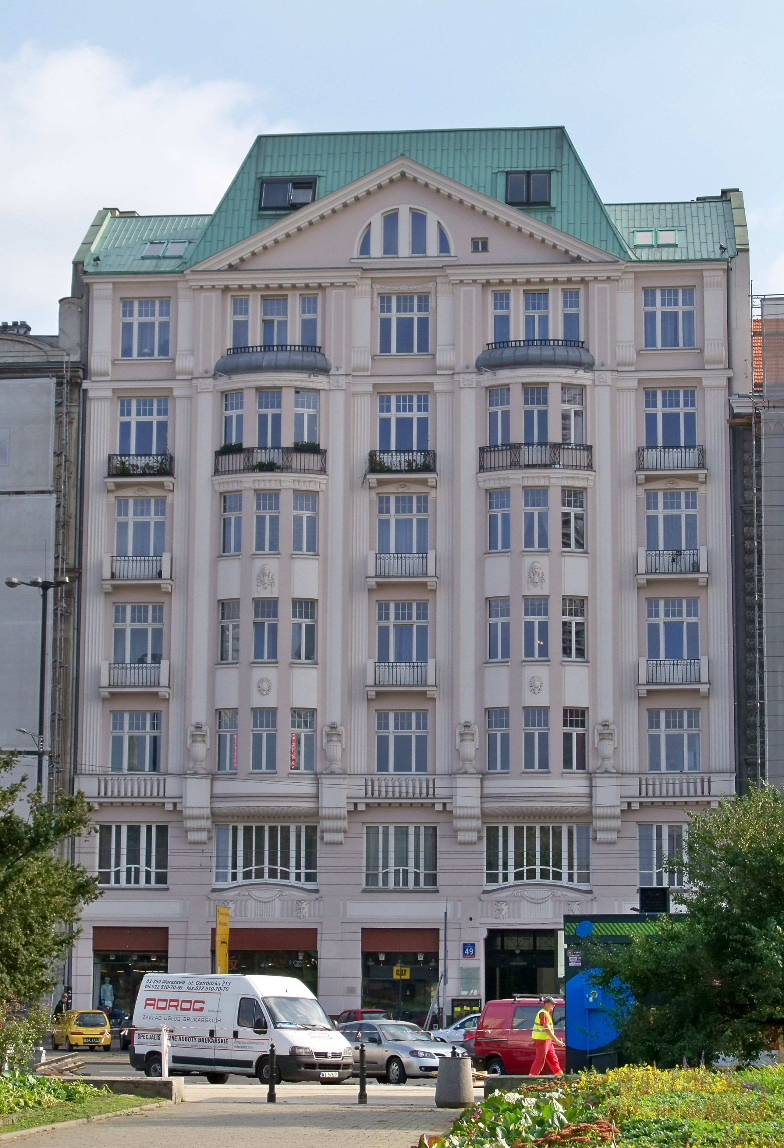 Kamienica Dawidsohna i Kadyńskiego. Al. Jerozolimskie 49 w Warszawie. Projekt: Józef Napoleon Czerwiński